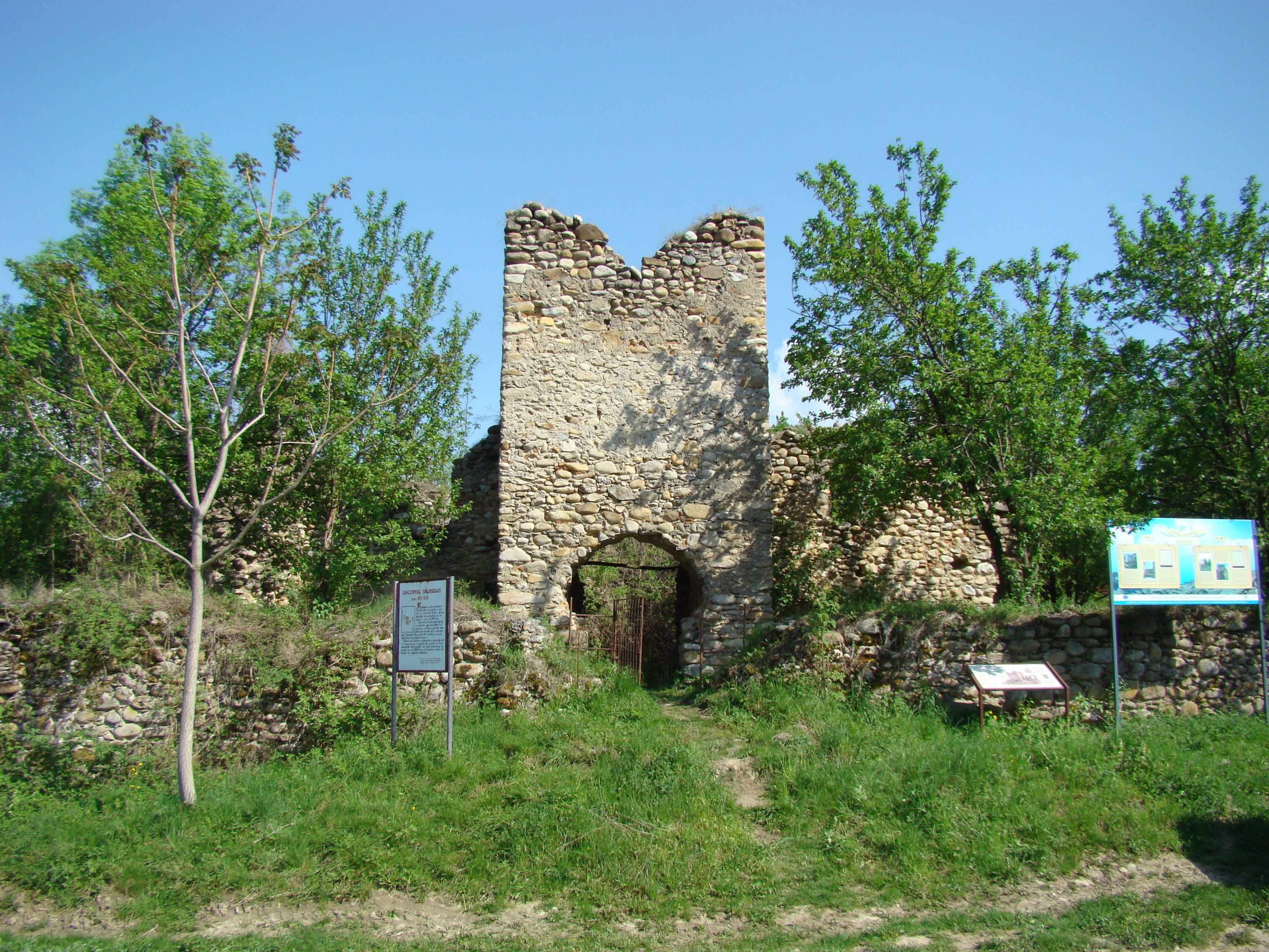 Curtea cnezilor Cândreş, sat SĂLAŞU DE SUS; comuna SĂLAŞU DE SUS